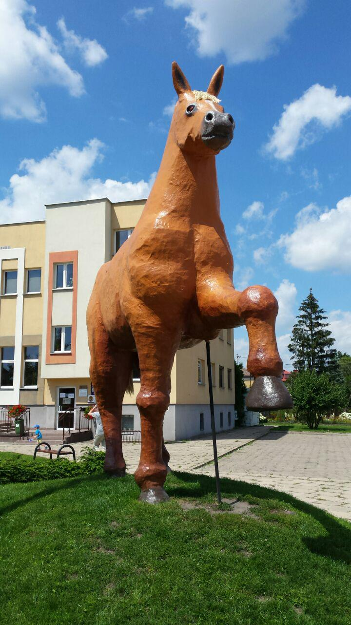 Pomnik kobyłki, oficjalnie "Kobyłka Niepodległości"